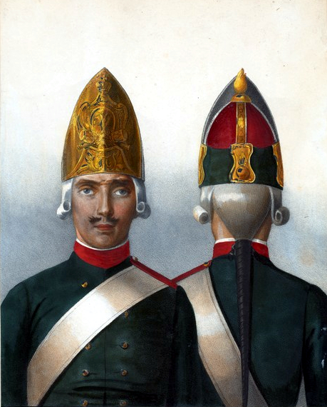 Фузелерные шапки Киевского Гренадерского полка. 1797-1801.